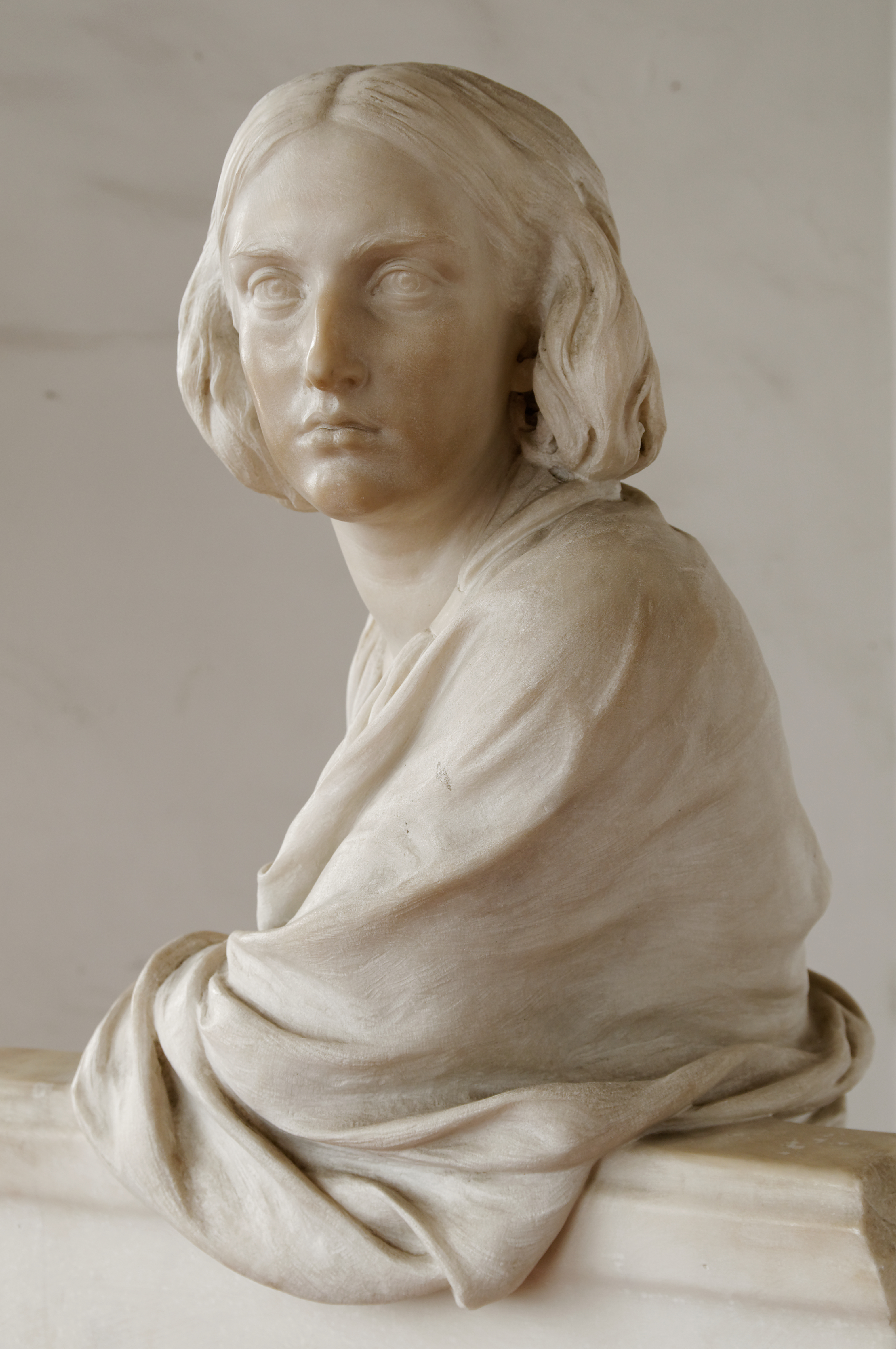 Carlotta d'Asburgo a MiramarePortrait of Carlota of Mexicotitle QS:P1476,it:"Carlotta d'Asburgo a Miramare" label QS:Lit,"Carlotta d'Asburgo a Miramare" label QS:Lfr,"Portrait de Charlotte de Belgique" label QS:Len,"Portrait of Carlota of Mexico"